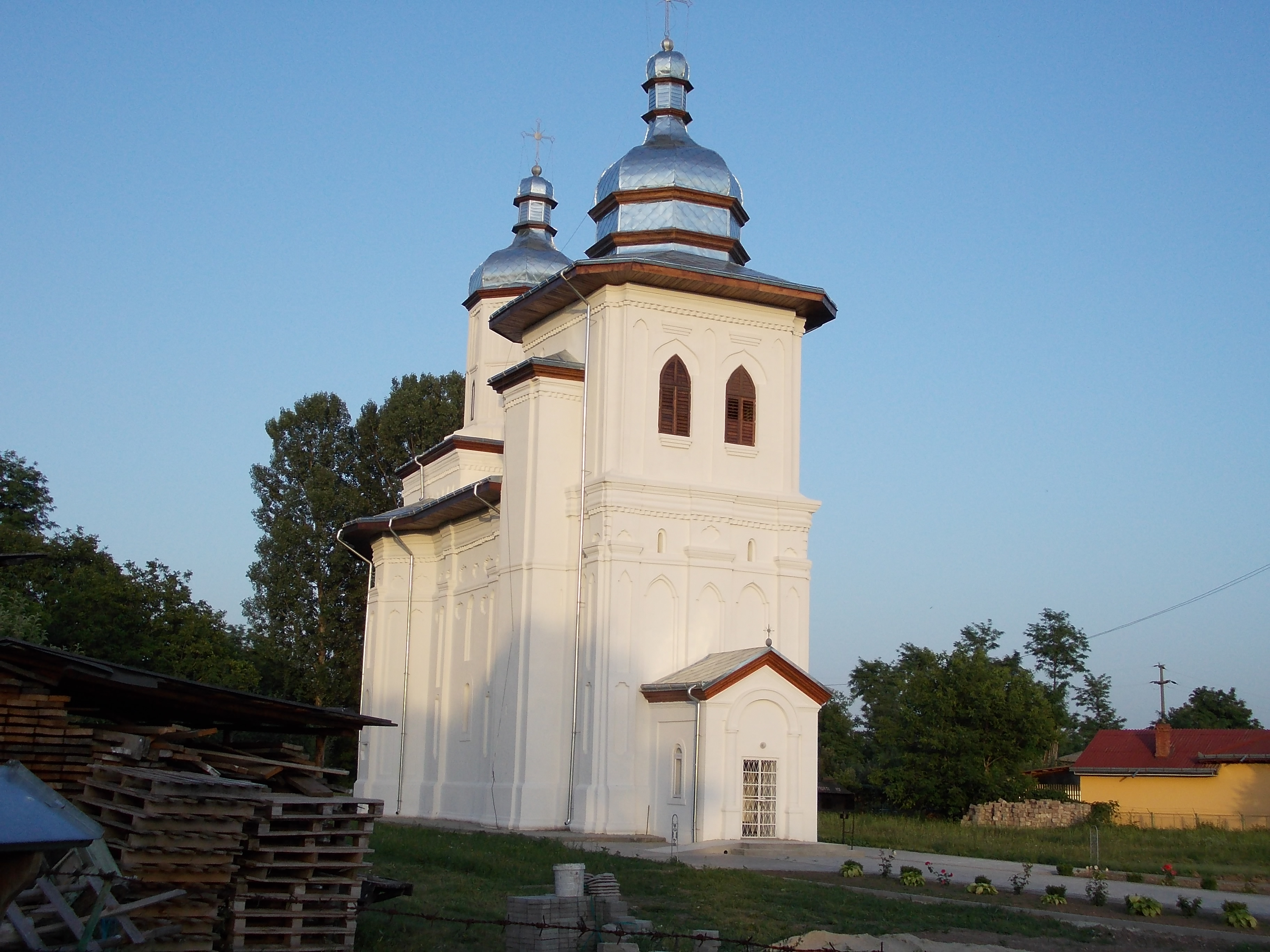 Biserica Sfânta Treime din Doljeşti, Neamţ